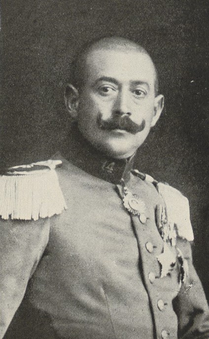 Francisco Javier Díaz Valderrama (Santa Cruz, 5 de abril de 1877-Santiago, 1950) fue un militar y político chileno. Fue inspector general del Ejército de Chile entre 1927 y 1930, ostentando el grado de general de División. Tras su retiro del ejército, fue miembro fundador del Movimiento Nacional-Socialista de Chile (MNS).